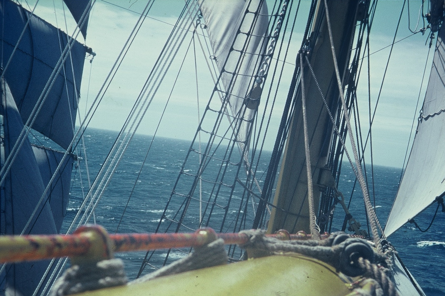 Untermars-Rah im Vortopp der Gorch Fock (1958)